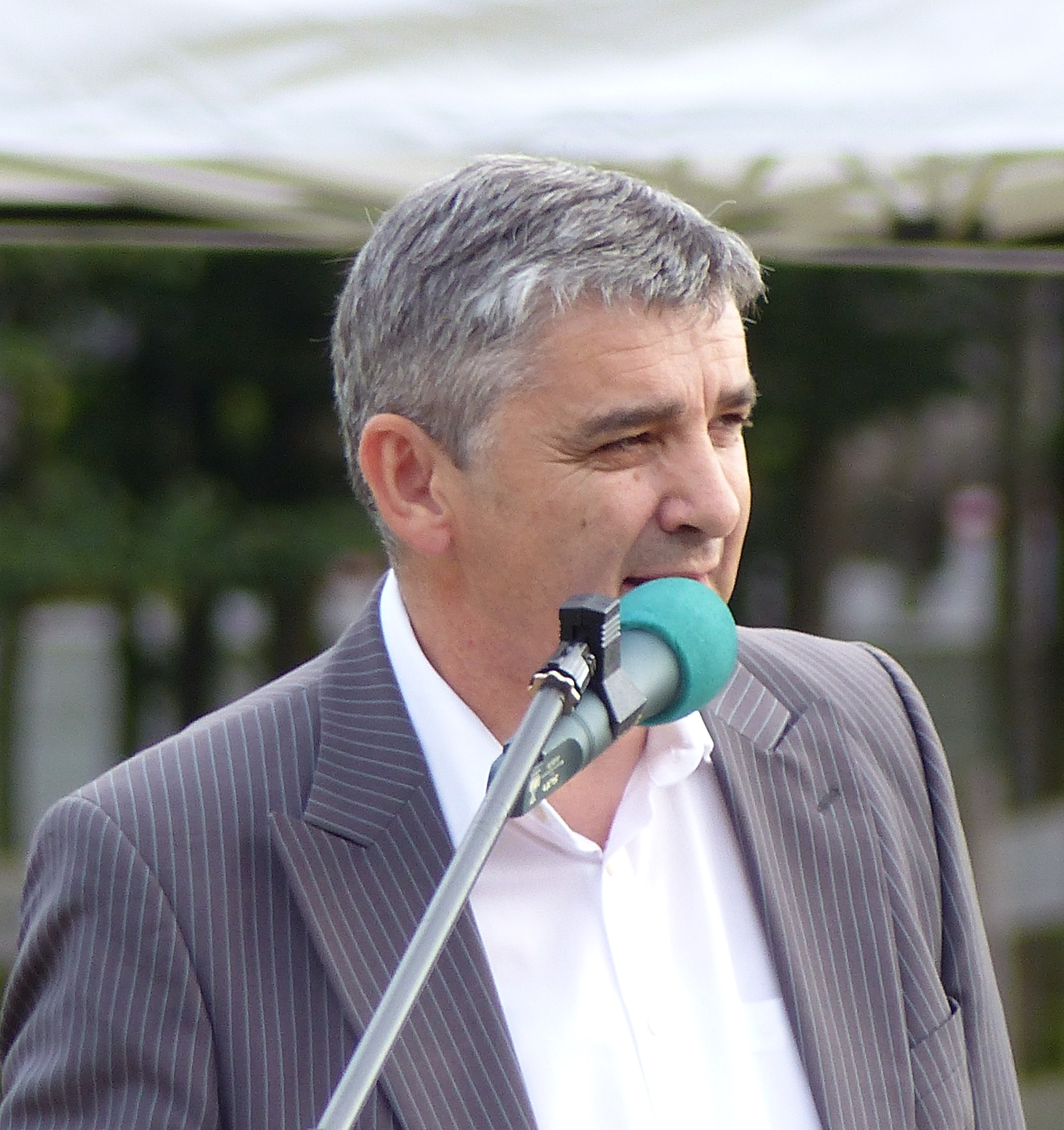 Walter Temmel bei einer Ansprache in Kleinmürbisch